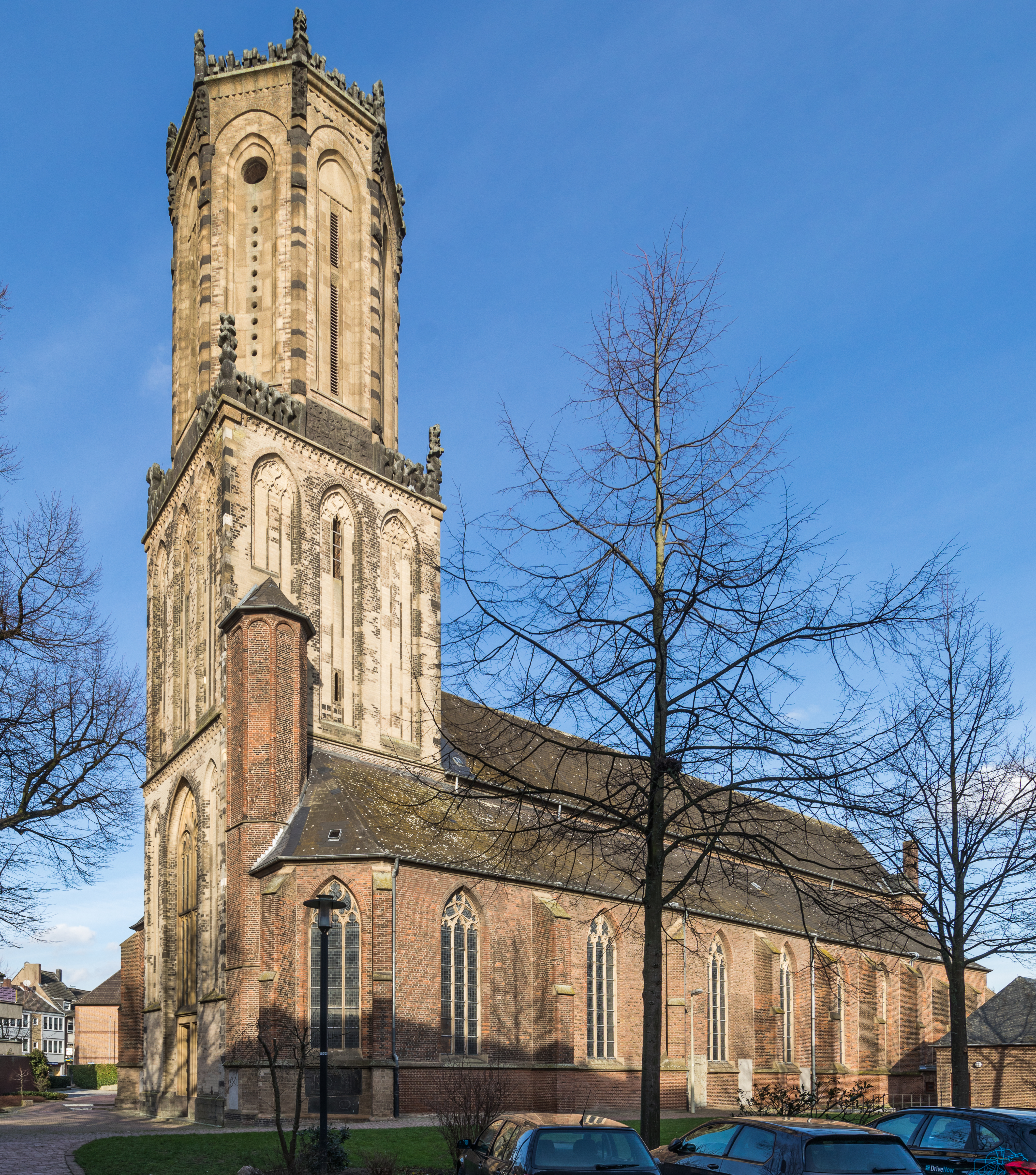 St. Aldegundis, Emmerich am Rhein. Ansicht von Südwesten This is a photograph of an architectural monument.